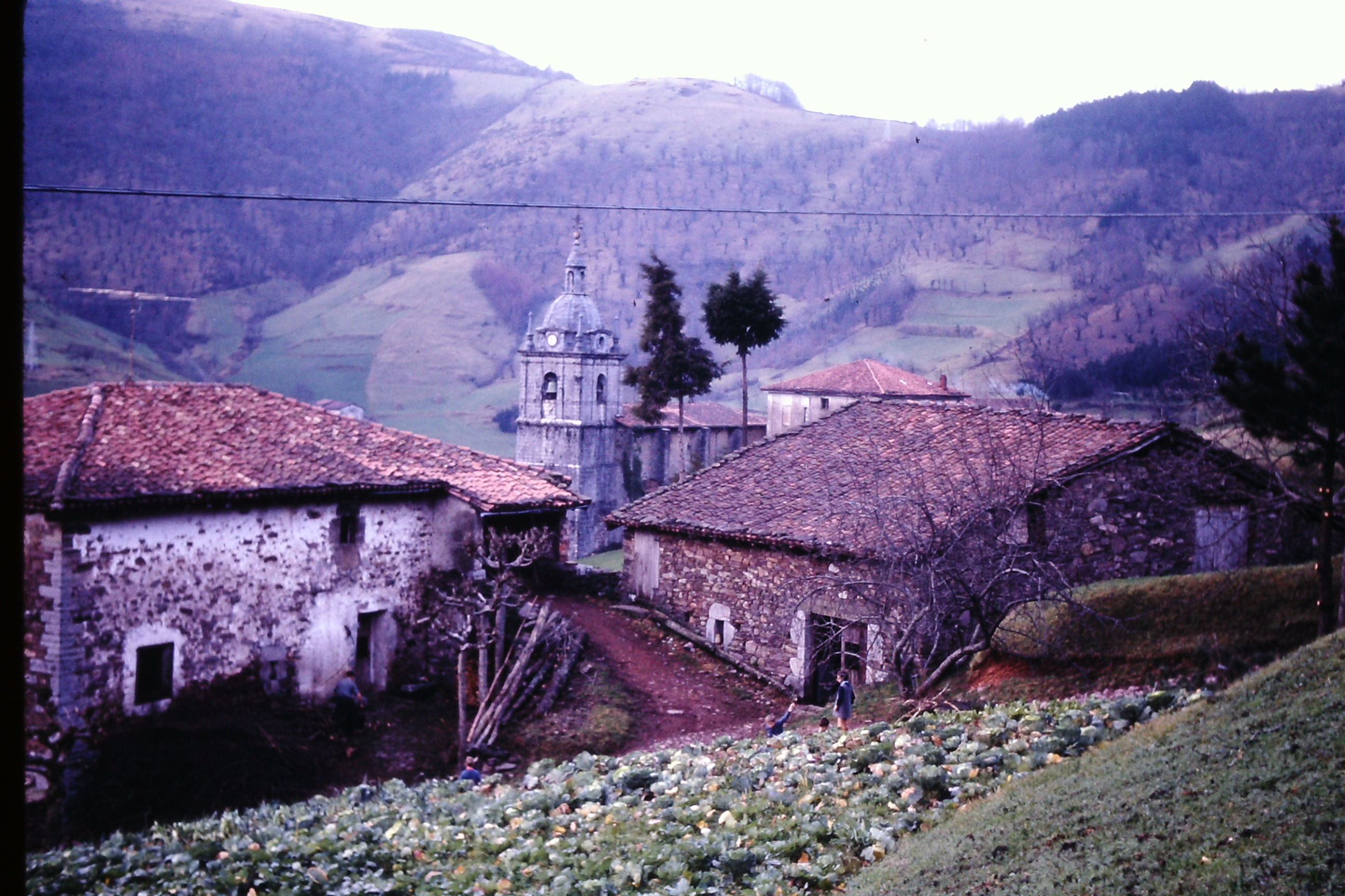 Elduain, Gipuzkoa, 1970 urte inguruan